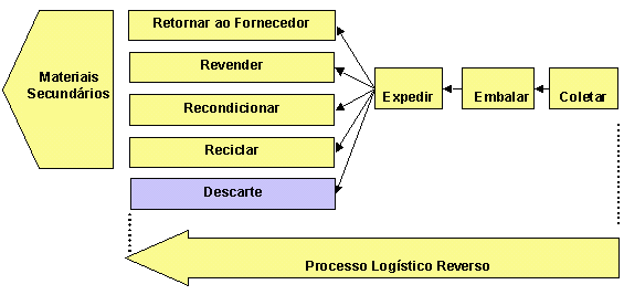 Processo Logístico Reverso